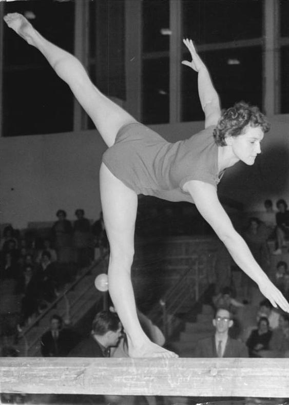 Ingrid Föst Zentralbild Zastrow 13.1.1960 Spitzensportlerinnen der DDR im Turnen UBz: Ingrid Föst auf dem Schwebebalken.